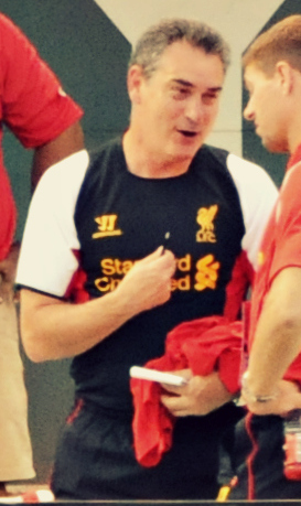 Pep Segura, LFC US Tour 2012.